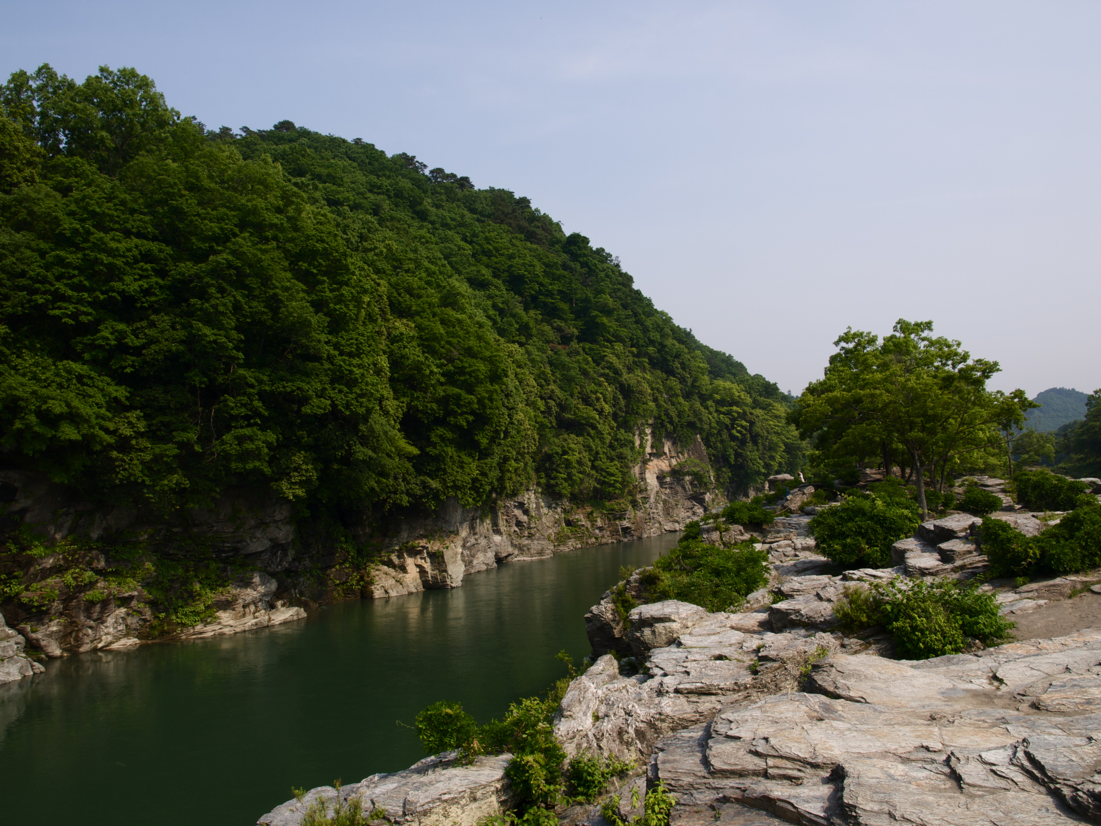 長瀞。 Nagatoro.